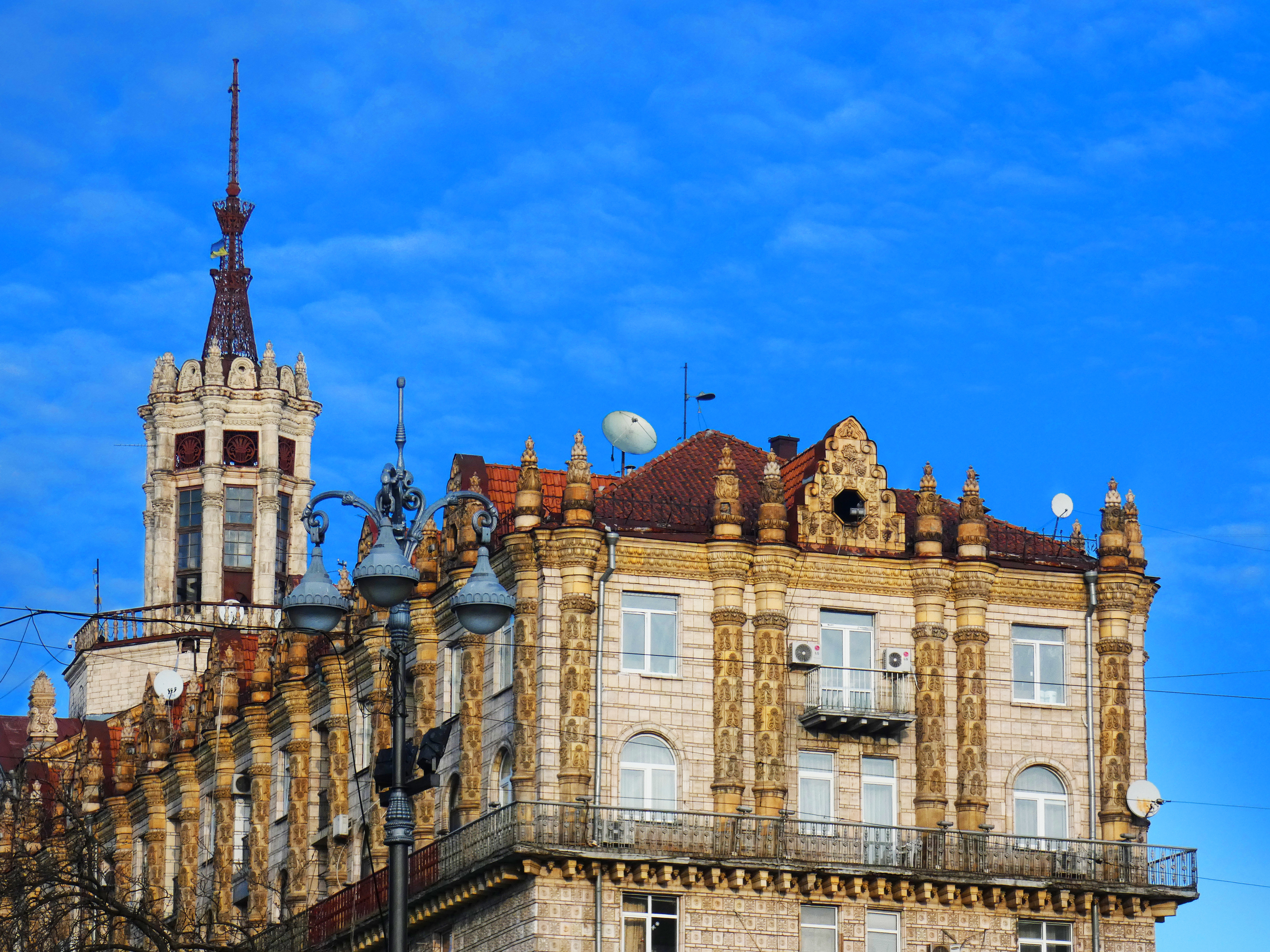 Комплекс будинків № 13 і 17. Хрещатик